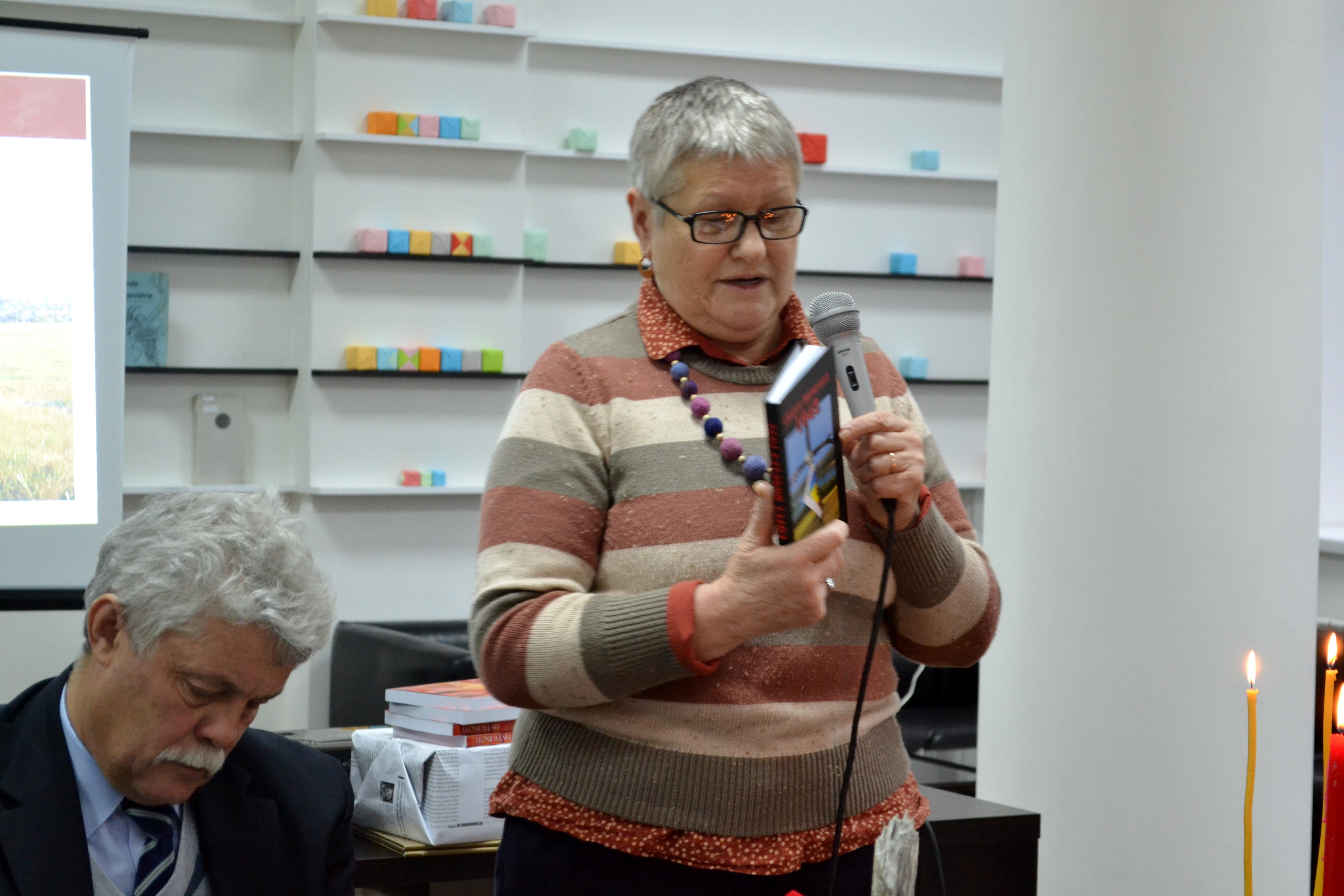 Lansare de carte „Cotul Donului 1942”, de Vasile Șoimaru. Biblioteca Centrală, 11.12.2013.